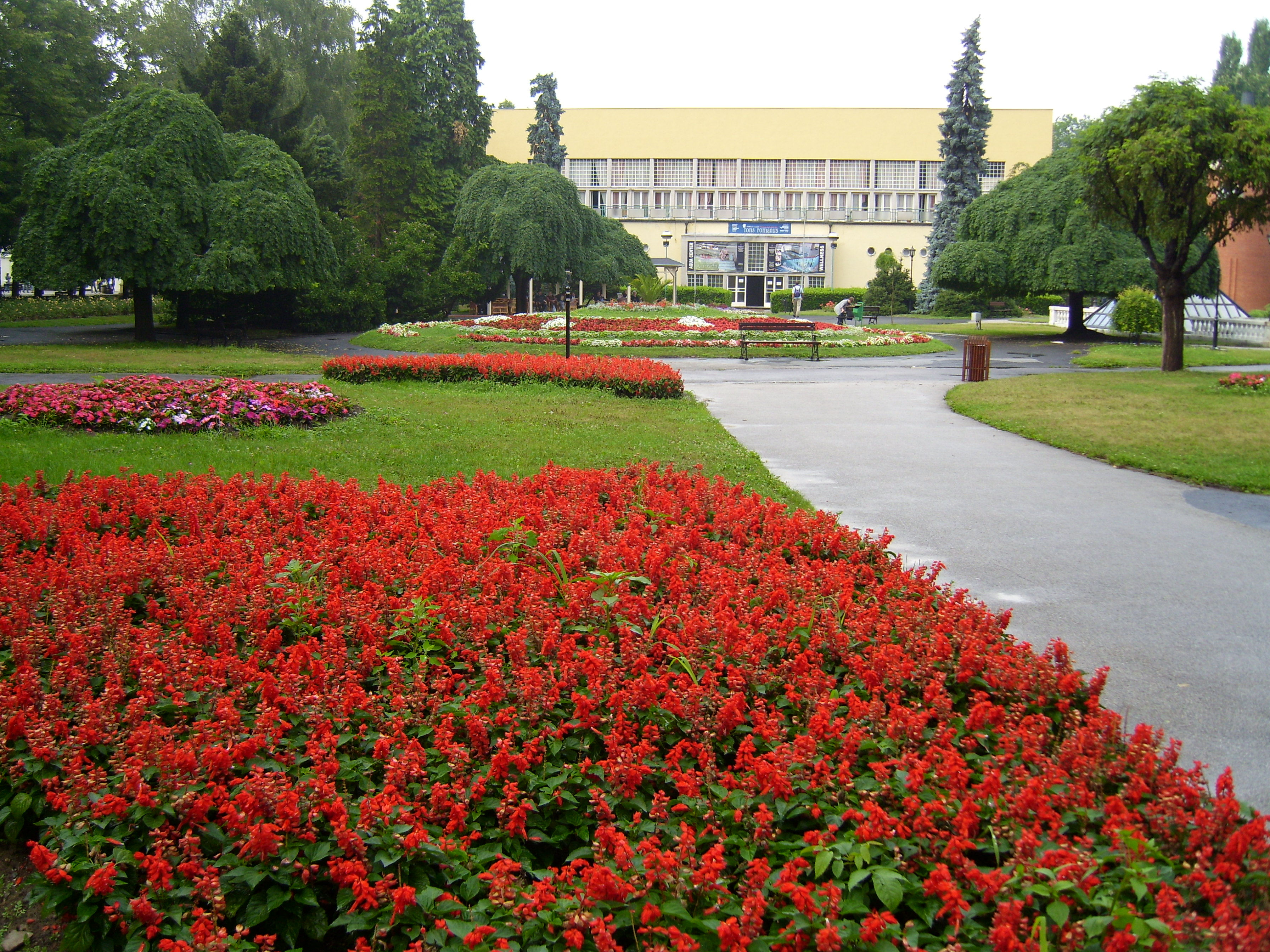 Vrnjačka Banja - park